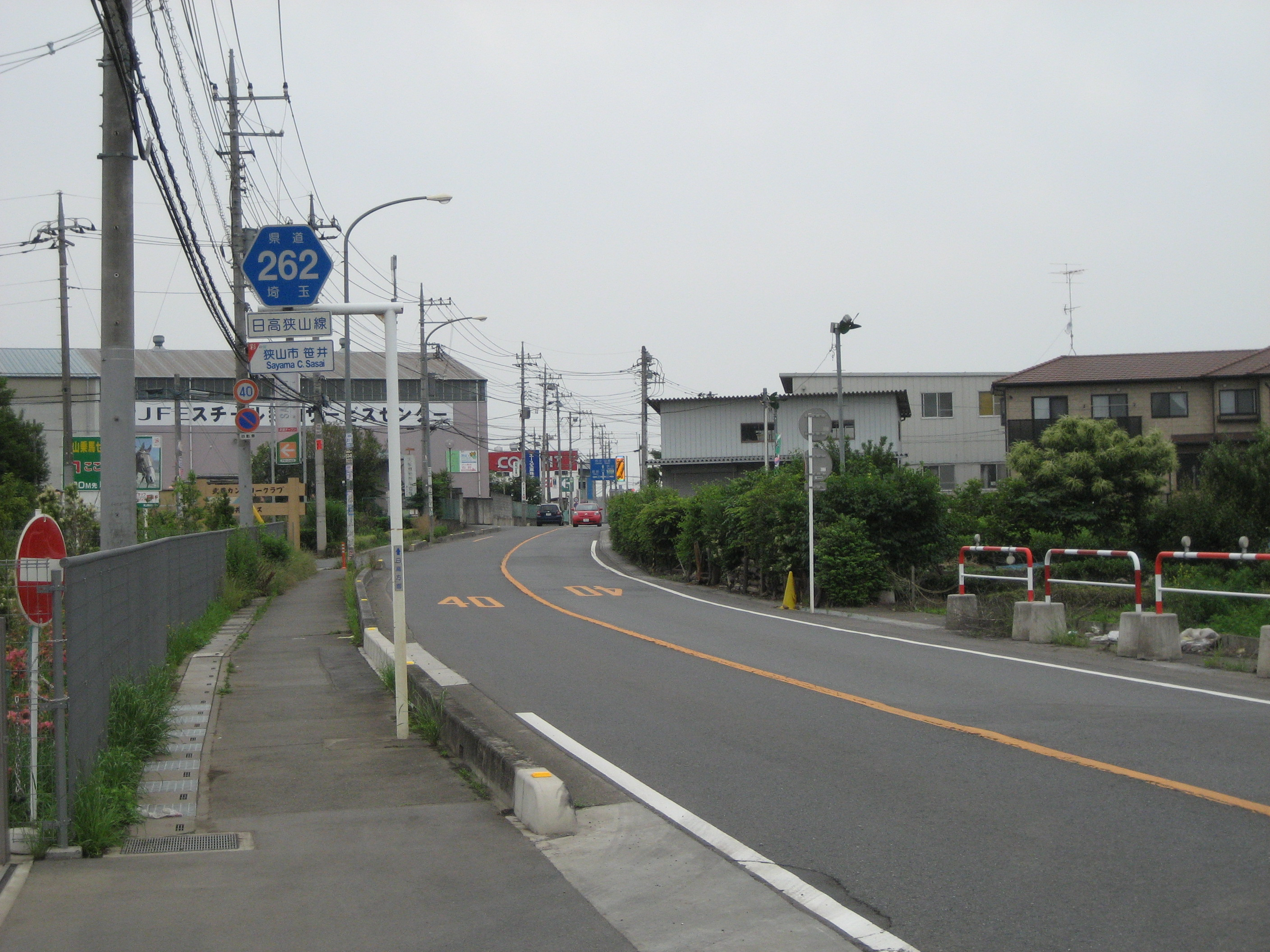 埼玉県道262号線狭山市内